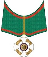 Insignia correspondiente al grado de Comendador de la Orden al Merito de la Republica Italiana.